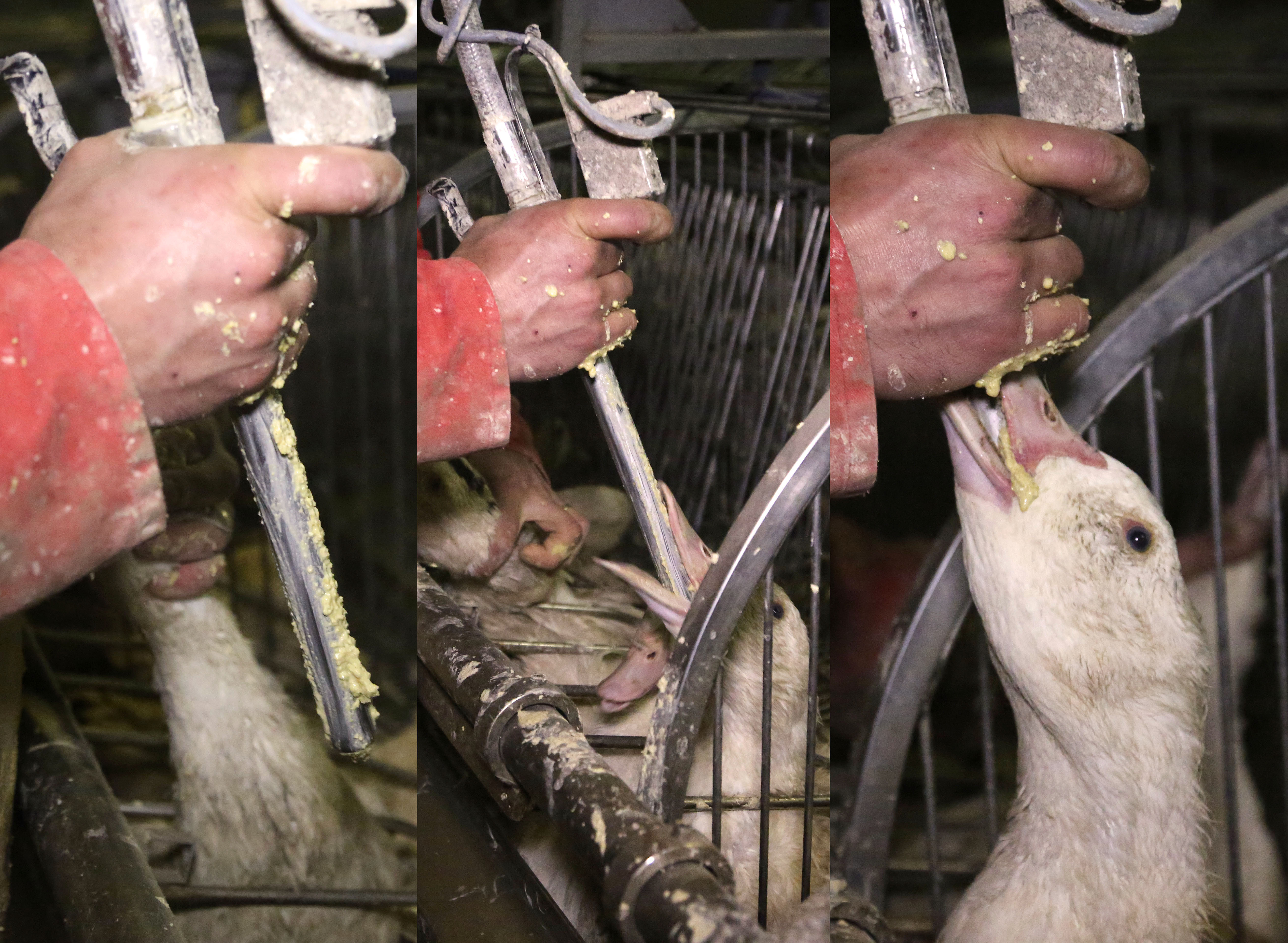 Composite montrant le détail du travail de gavage